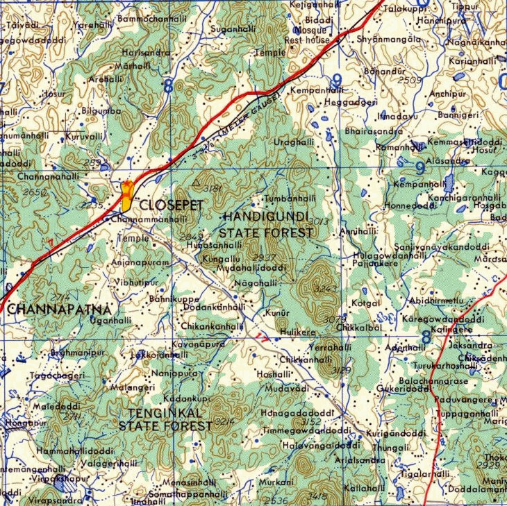 Map of Ramanagaram area, India